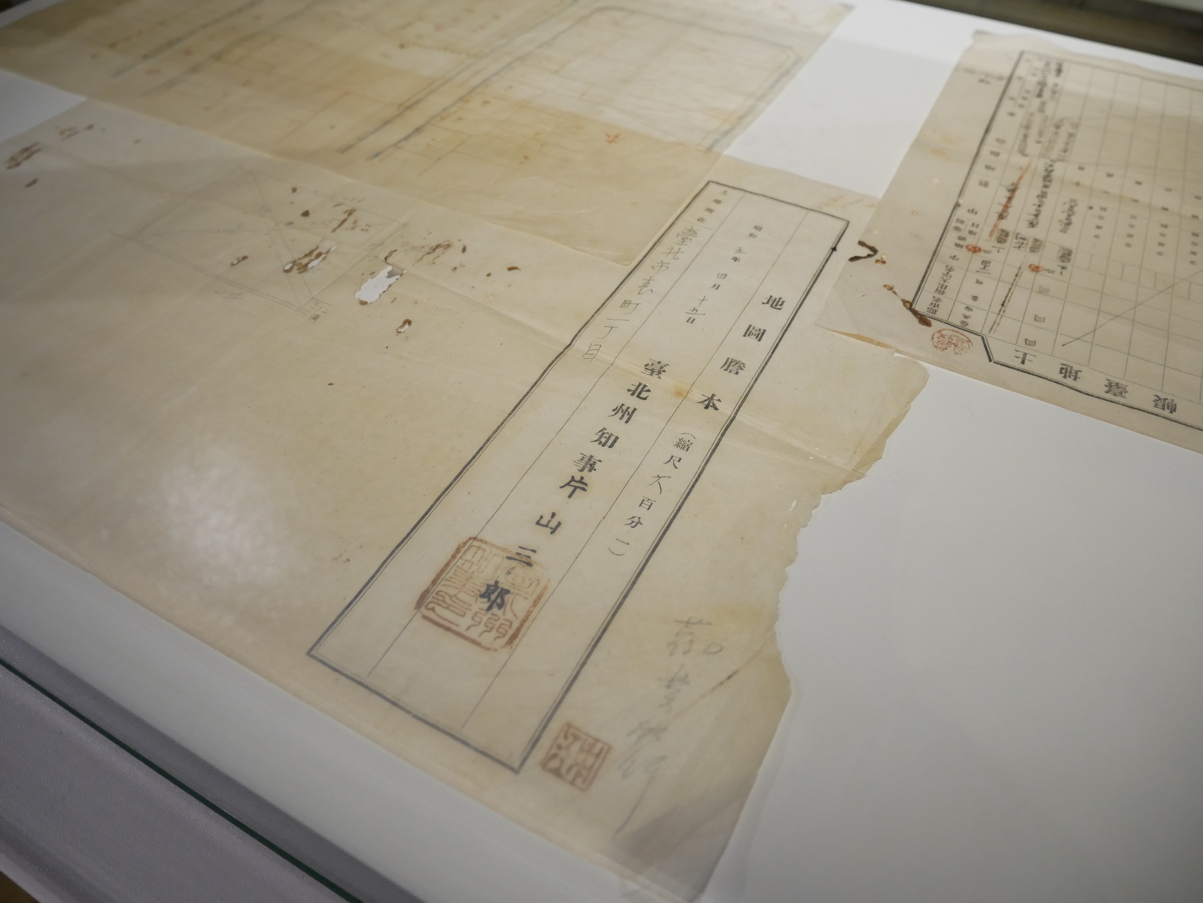 勸業銀行臺北支店土地臺帳謄本與地圖謄本，臺北市中正區城內次分區黎明里